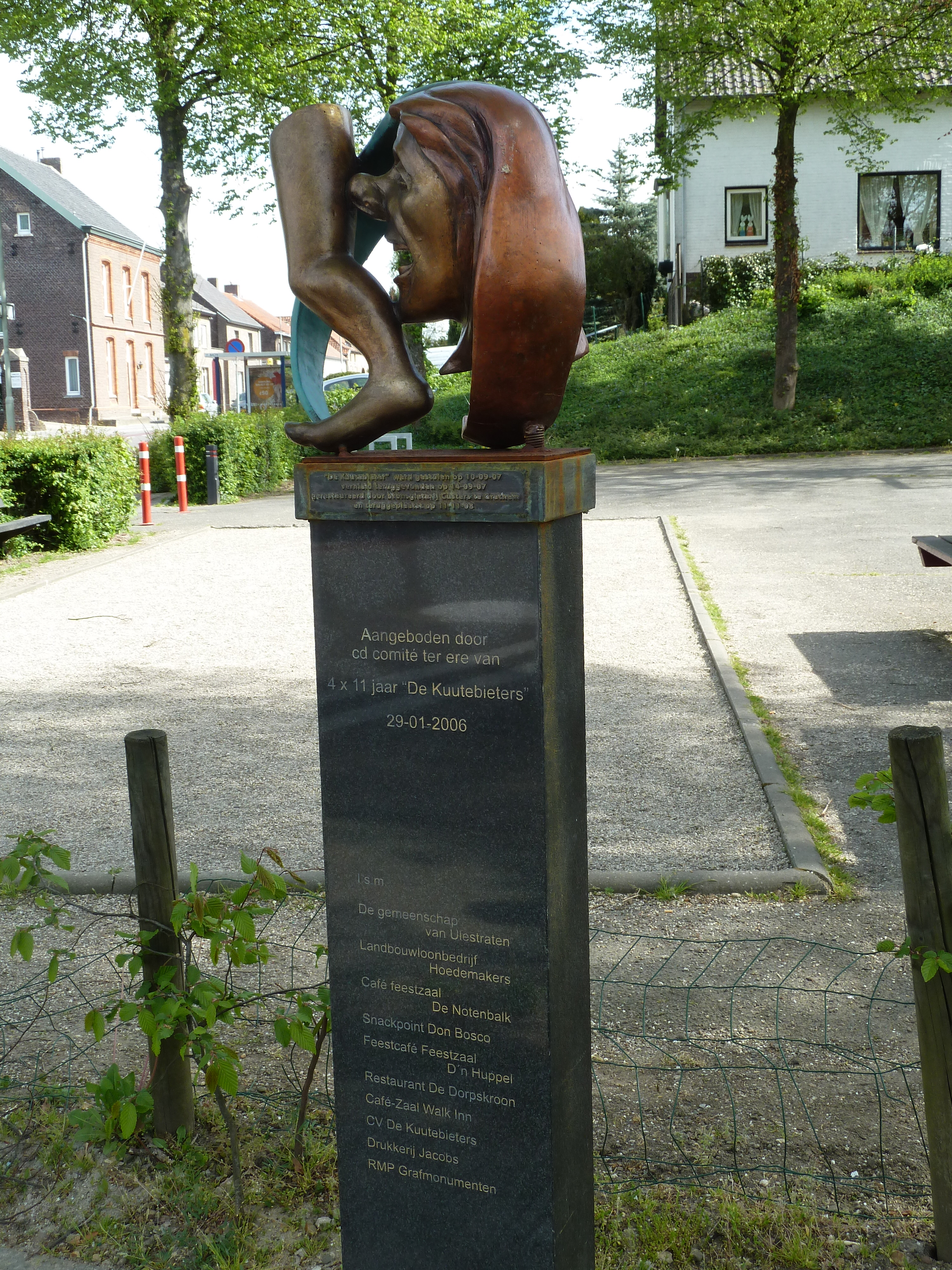 De nar van Ulestraten, Limburg, Nederland